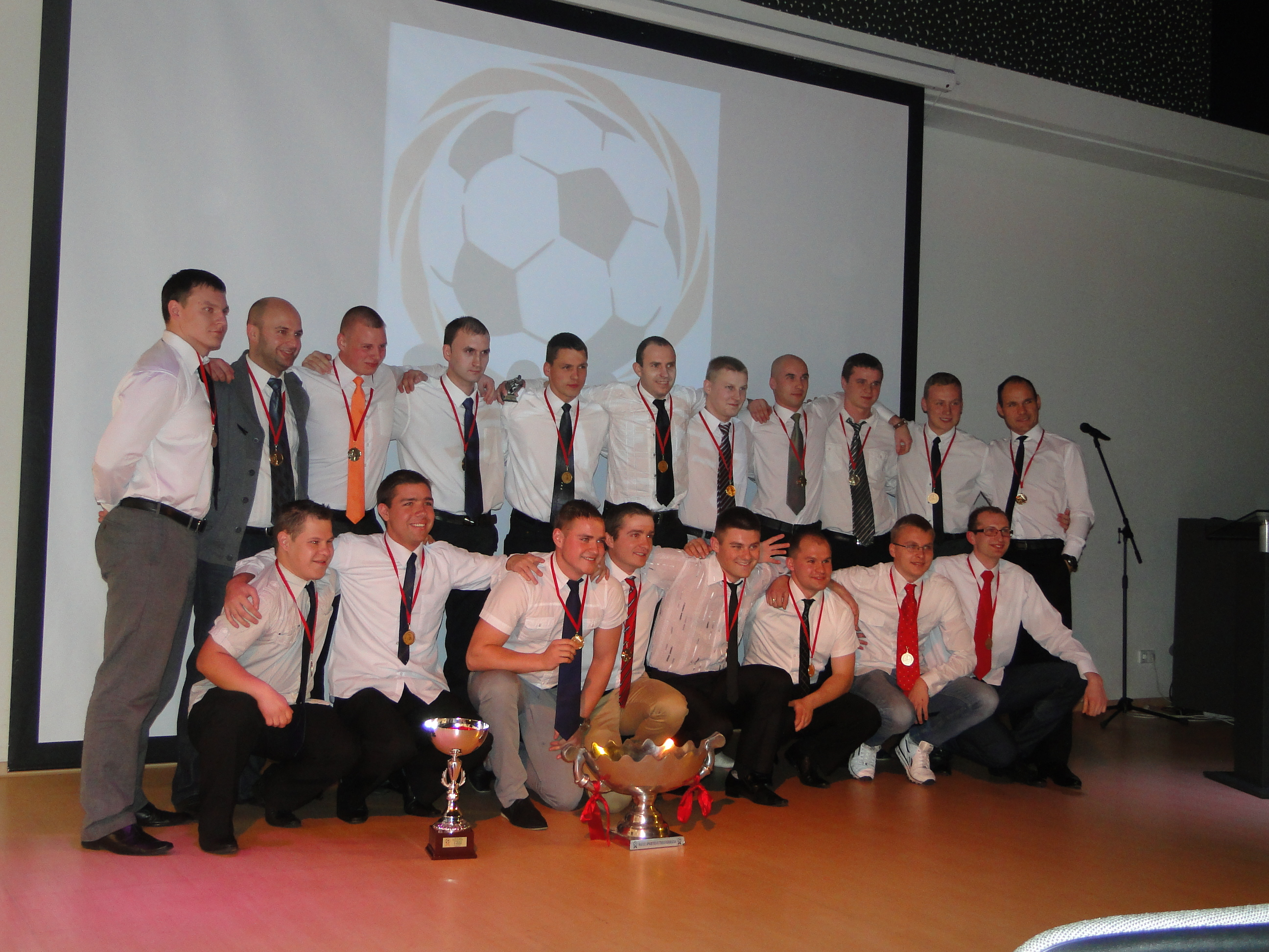 FC Kupsc komanda 2012 m. ŠAFF sezono uždarymo šventėje